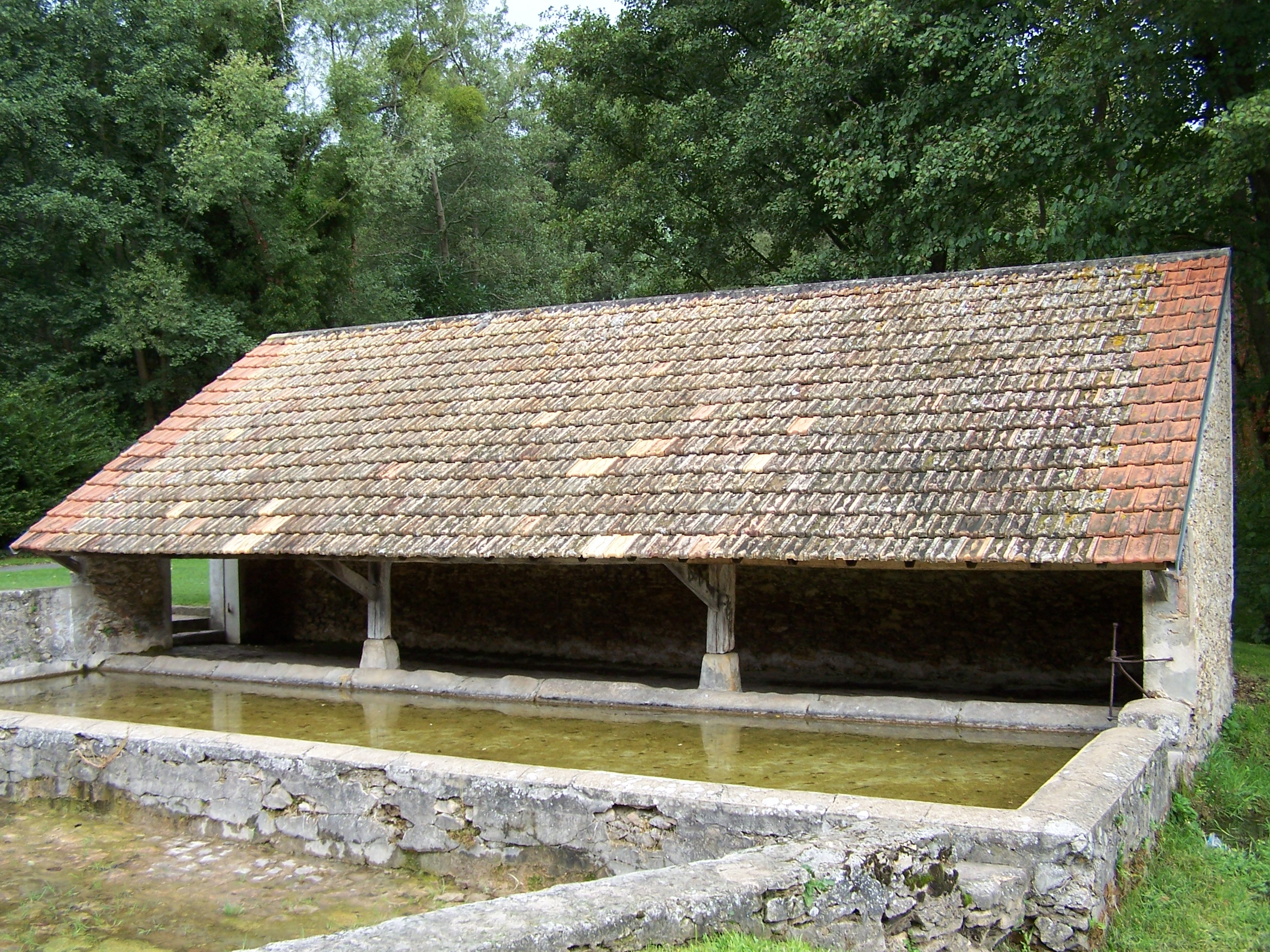 Lavoir de Moutiers à Bullion (Yvelines, France)